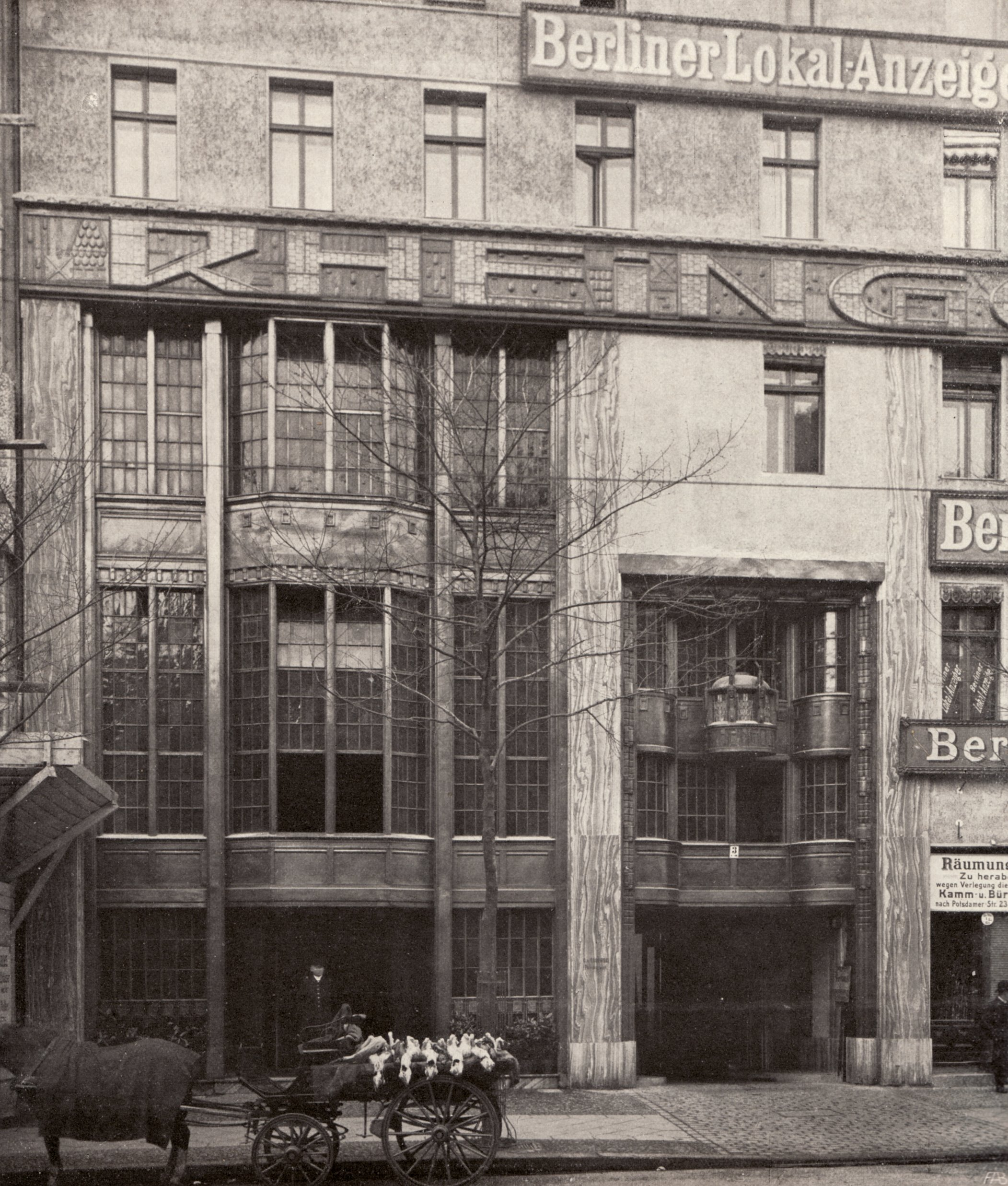 Berlin - Weinhaus Rheingold, Fassade an der Potsdamerstraße